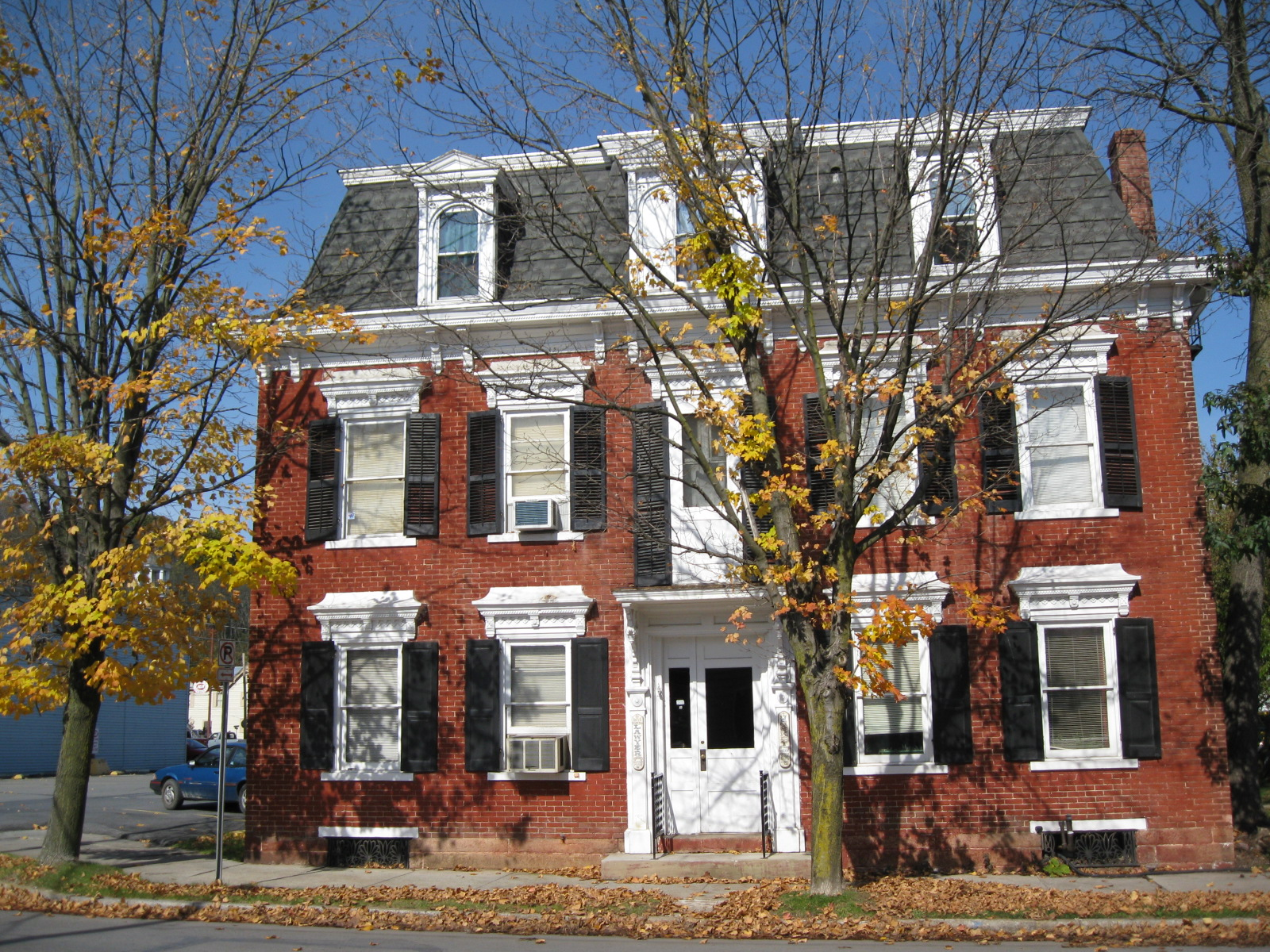 Middleburg, Pennsylvania